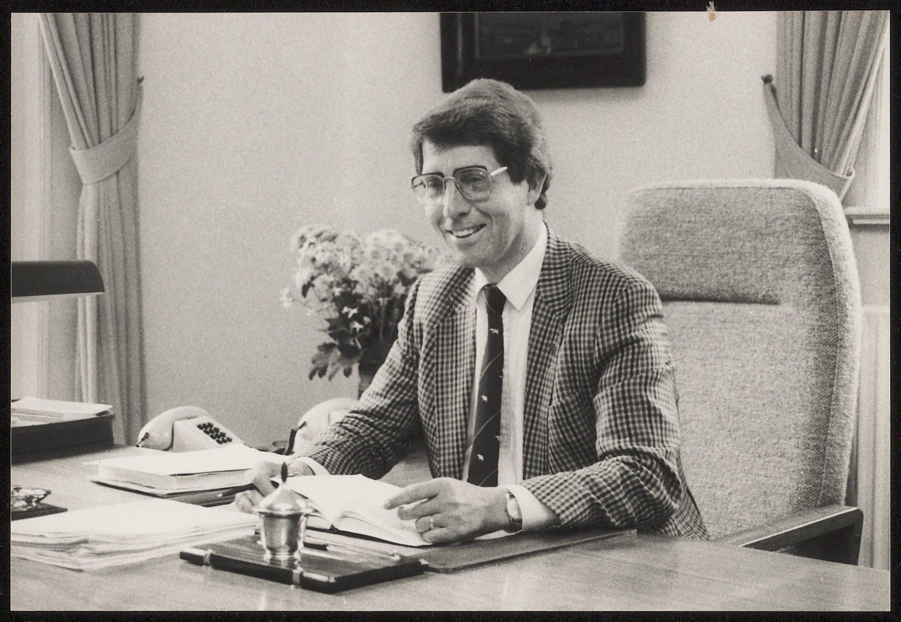 Burgemeester E. Wilmink, van 1985 tot 1992 burgemeester van Lochem.